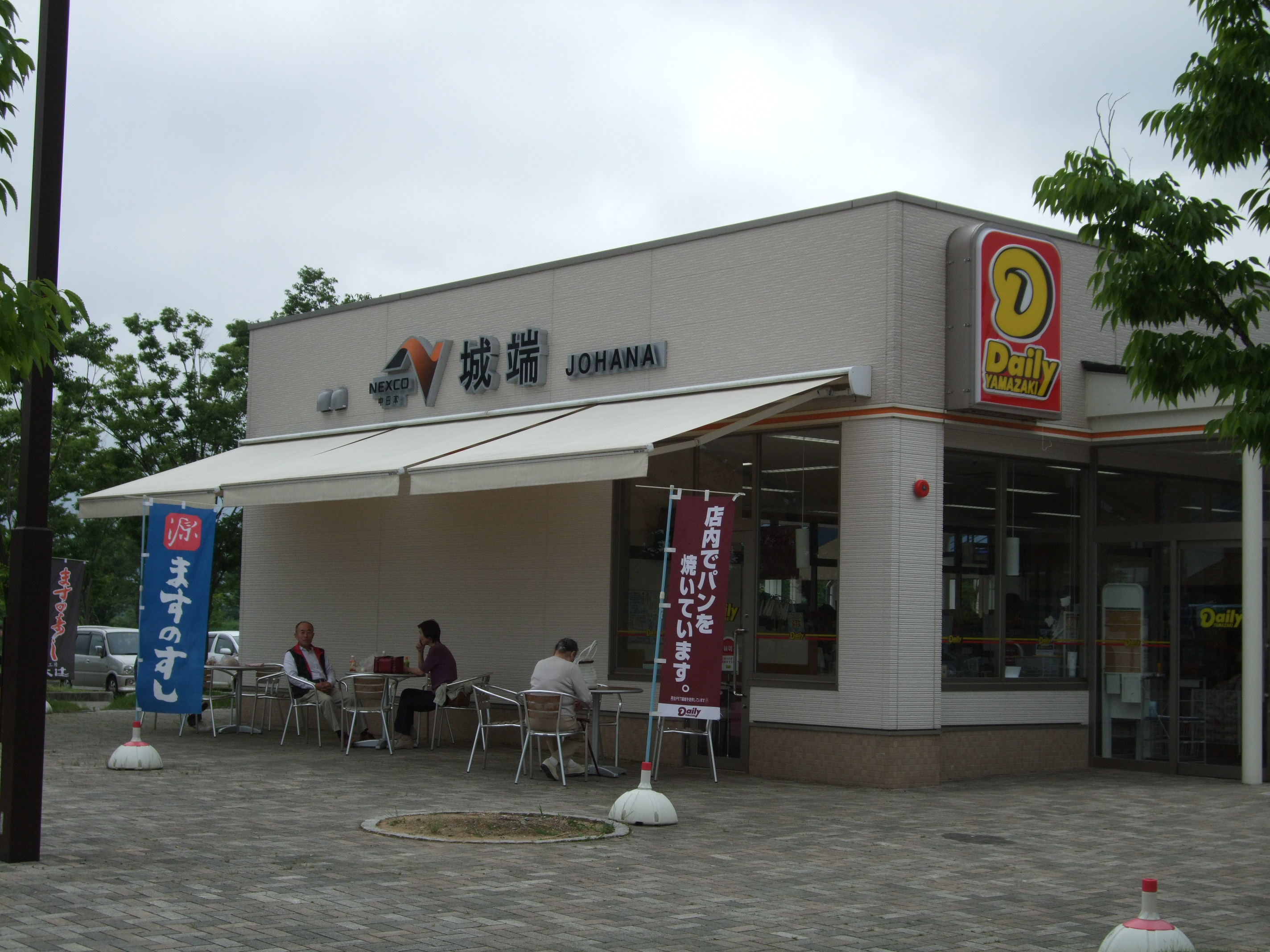 城端サービスエリア デイリーヤマザキ